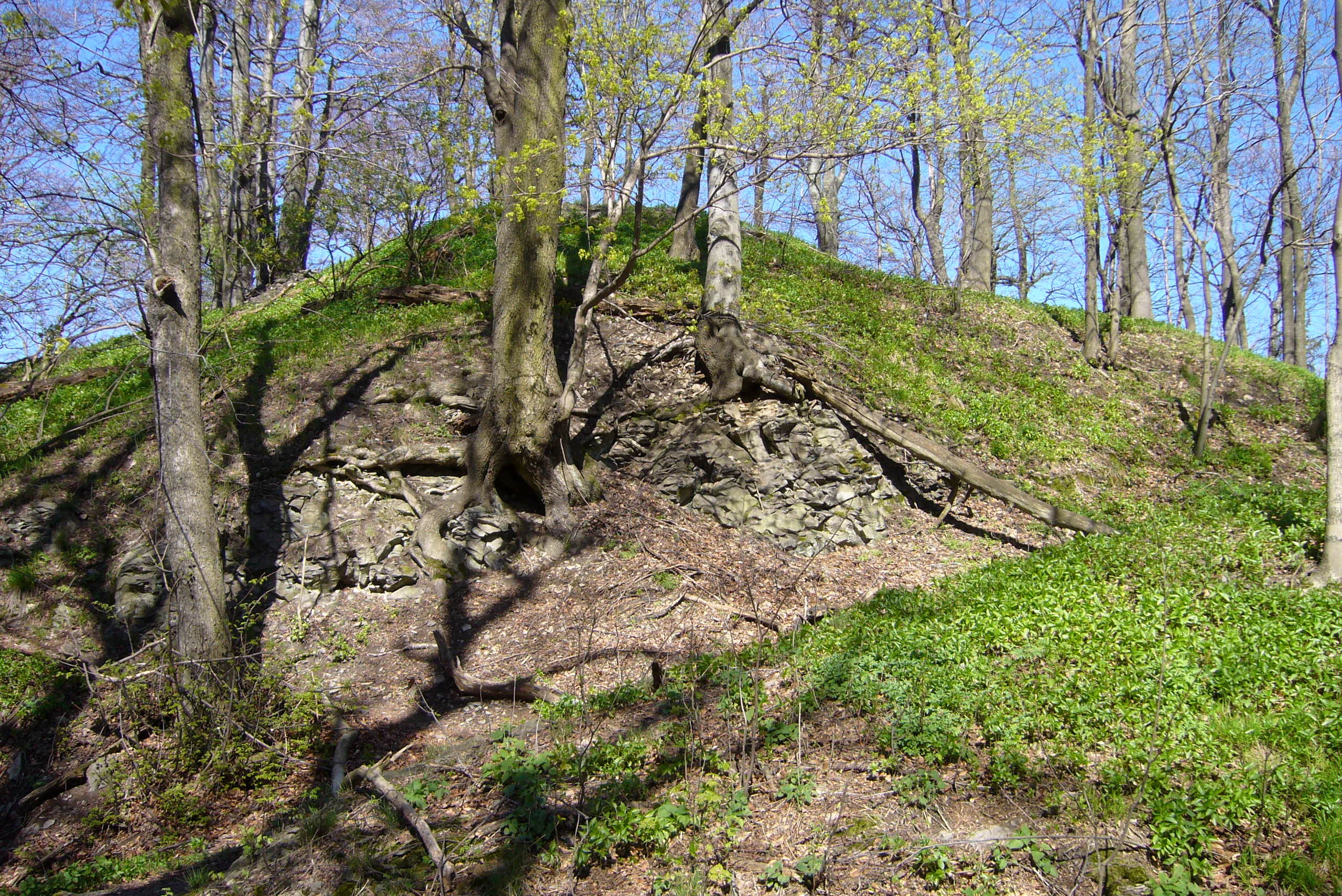 Falkenburk – celkový pohled